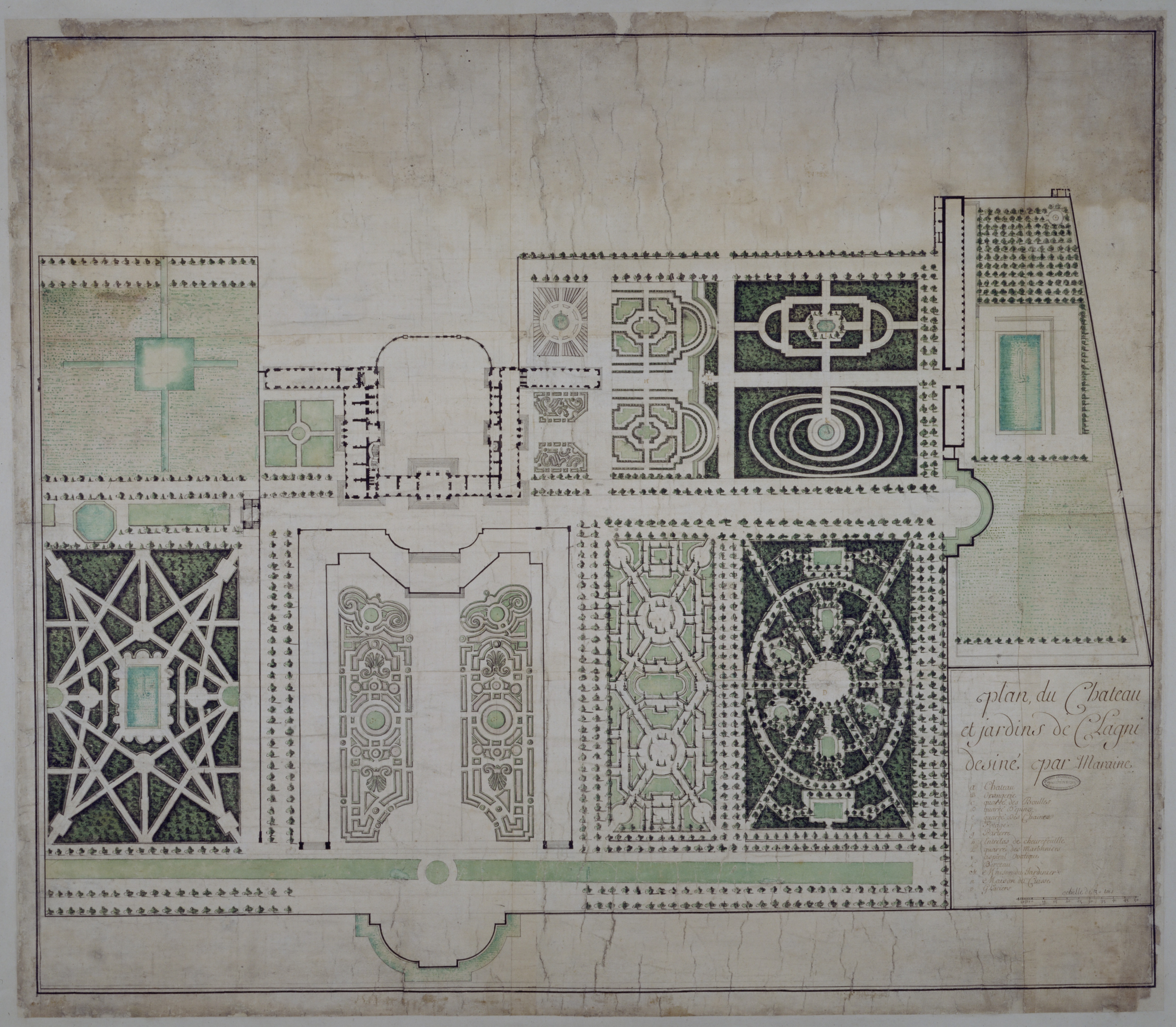 Plan du château et des jardins de Clagny dessiné par Maraine, XVIIe siècle